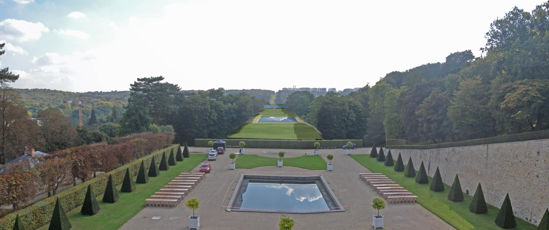 Schéma photographique restituant la Grande Perspective de Meudon, en direction du Sud. 2015. Aujourd'hui, après le parterre situé au premier plan, l'axe est bouché jusqu'à l'étang visible au dernier plan.